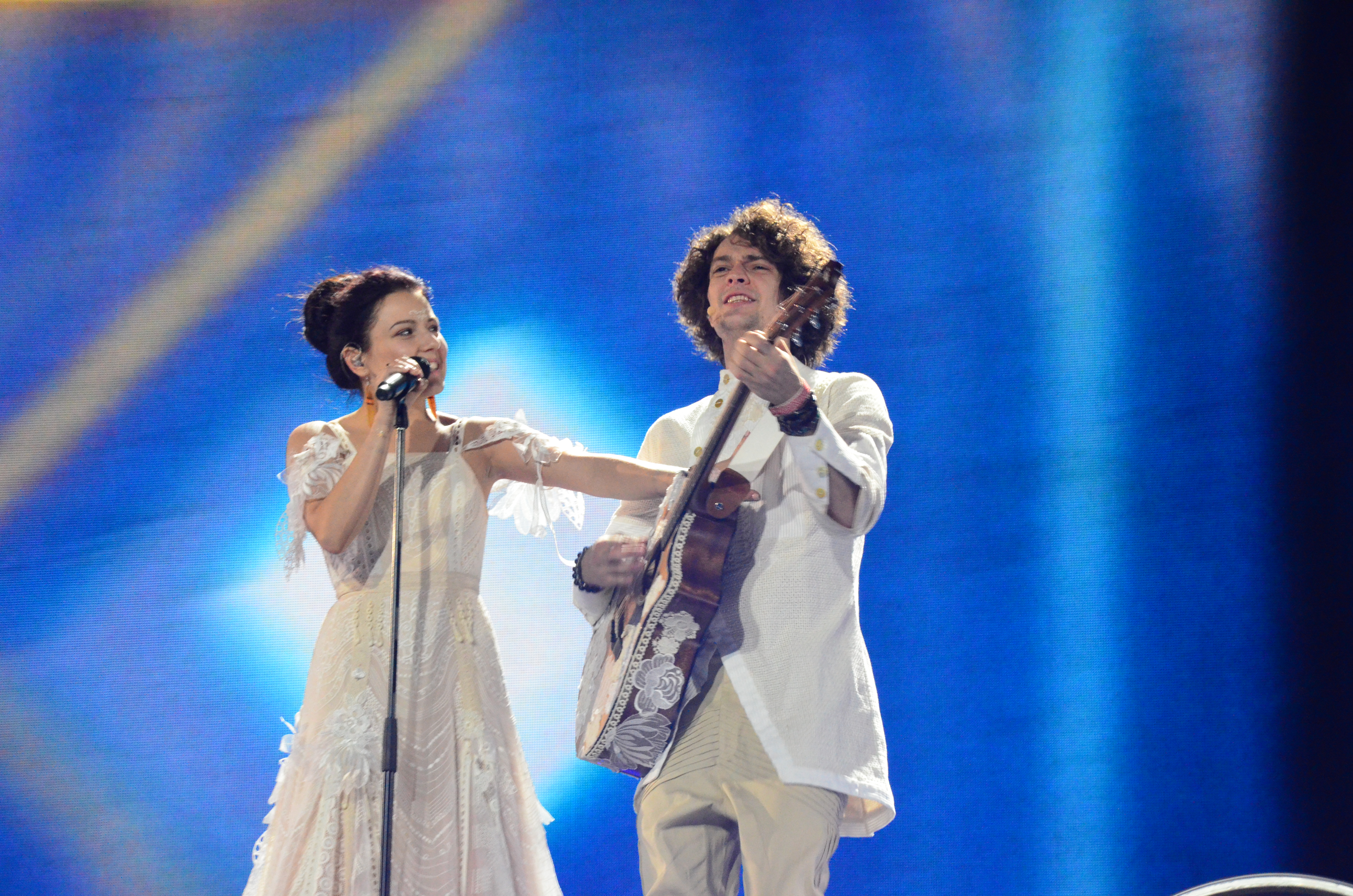 12 травня. Генеральна репетиція фіналу Євробачення 2017. NaviBand, Belarus.